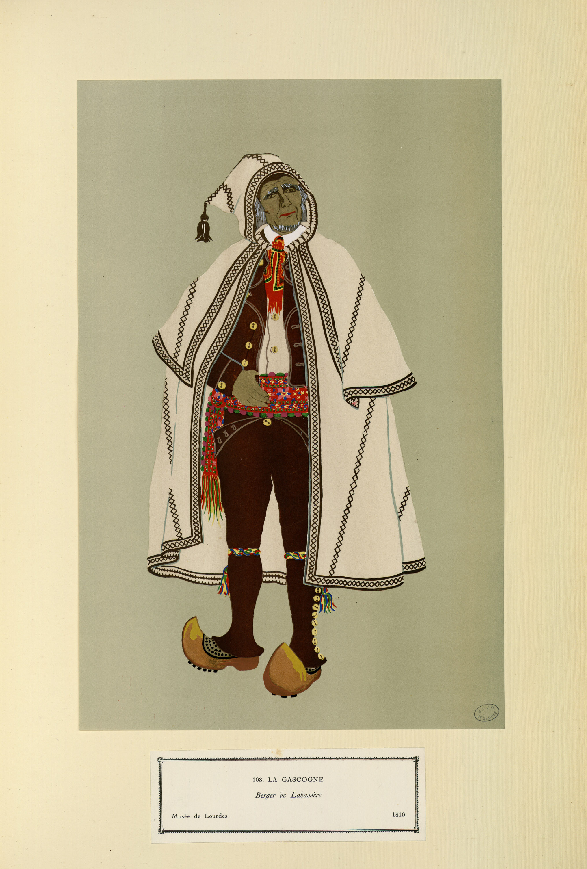 Fac-similé des deux-cents gouaches en couleur exposées en Janvier 1928 chez Bernheim jeune à Paris. Les originaux édités vont alors au Métropolitain Museum de New-York. La série comporte 25 fascicules de 240 francs pièce. Les 27 planches rassemblées ici sont les suivantes: pl. 34, 35, 36, 37, 38, 39, 40, 86, 87, 88, 89, 90, 91, 106, 107, 108, 109, 110, 111, 112, 113, 114, 115, 122, 123, 124, 125. Pièces jointes : prospectus du fac-similé des deux-cents gouaches en couleur exposées en Janvier 1928 chez Bernheim-jeune (galerie) à Paris et catalogue de cette exposition de 1928. Ancely, René (1876 - 1966). Possesseur